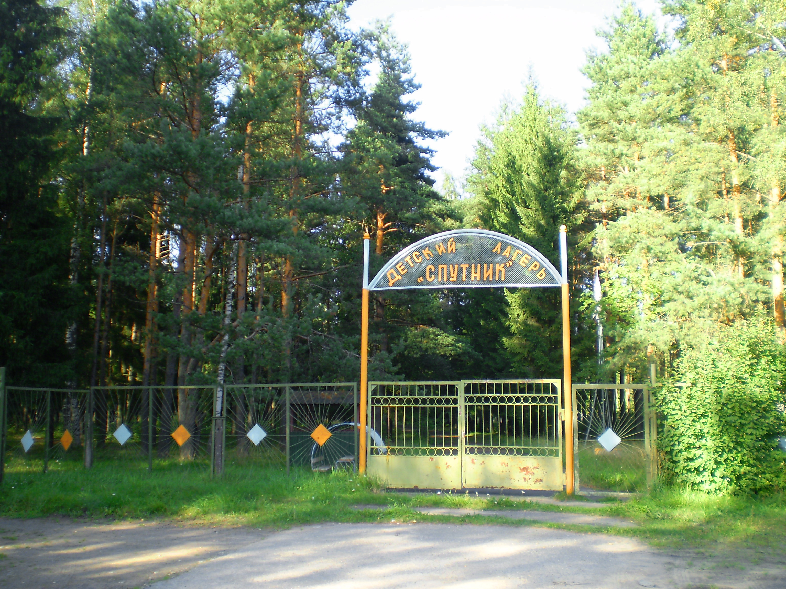 ДОЛ «Спутник» в Кяселеве